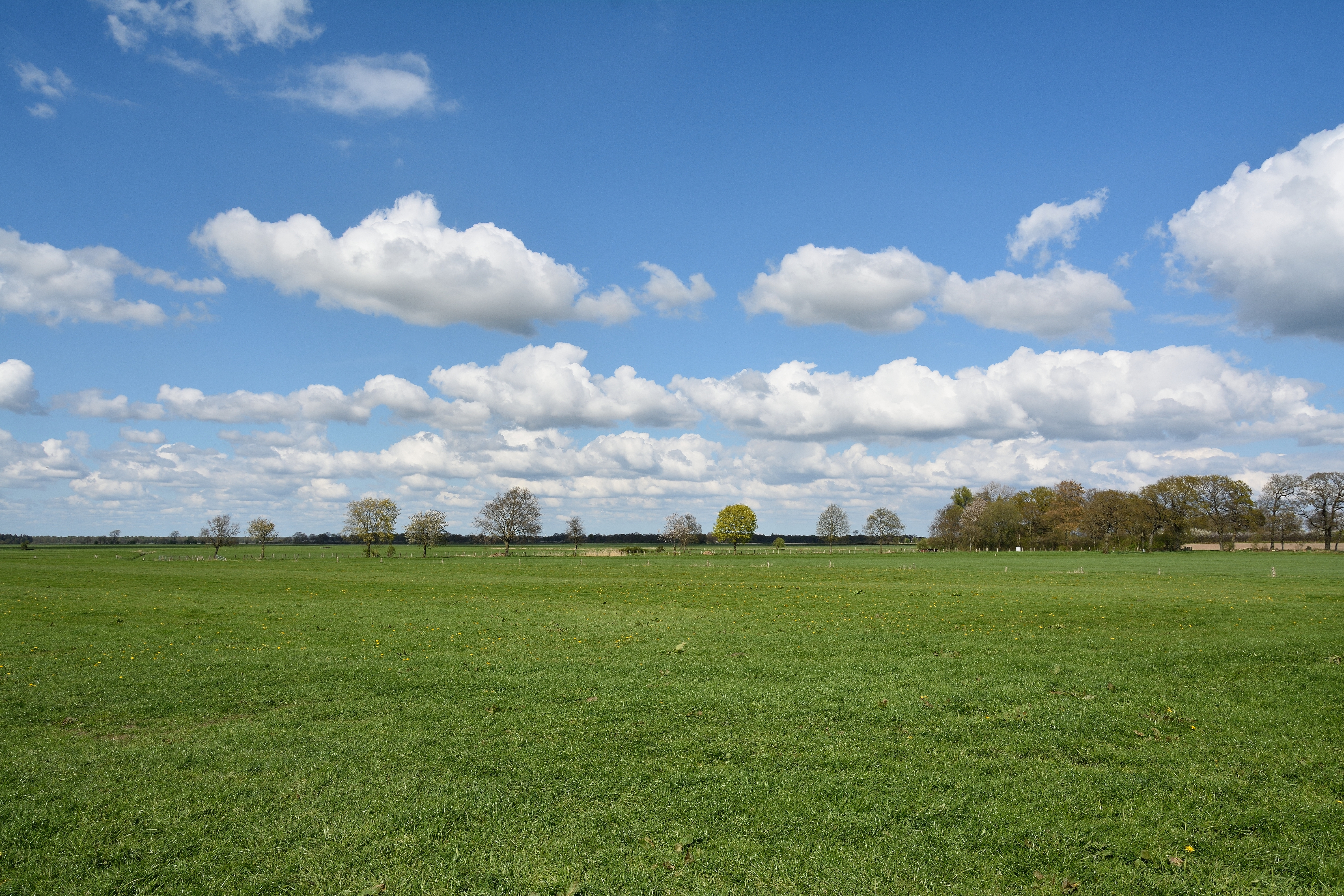 Blick in das flache Landschaftsschutzgebiet "Winselmoor/Hörnerau-Niederung" im Kreis Pinneberg